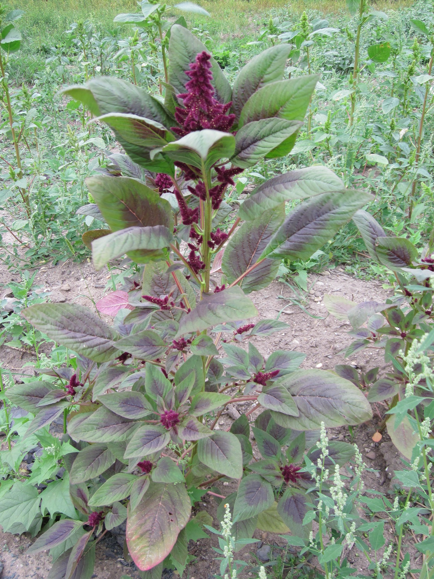 Rispen-Fuchsschwanz (Amaranthus cruentus) bei Altlußheim